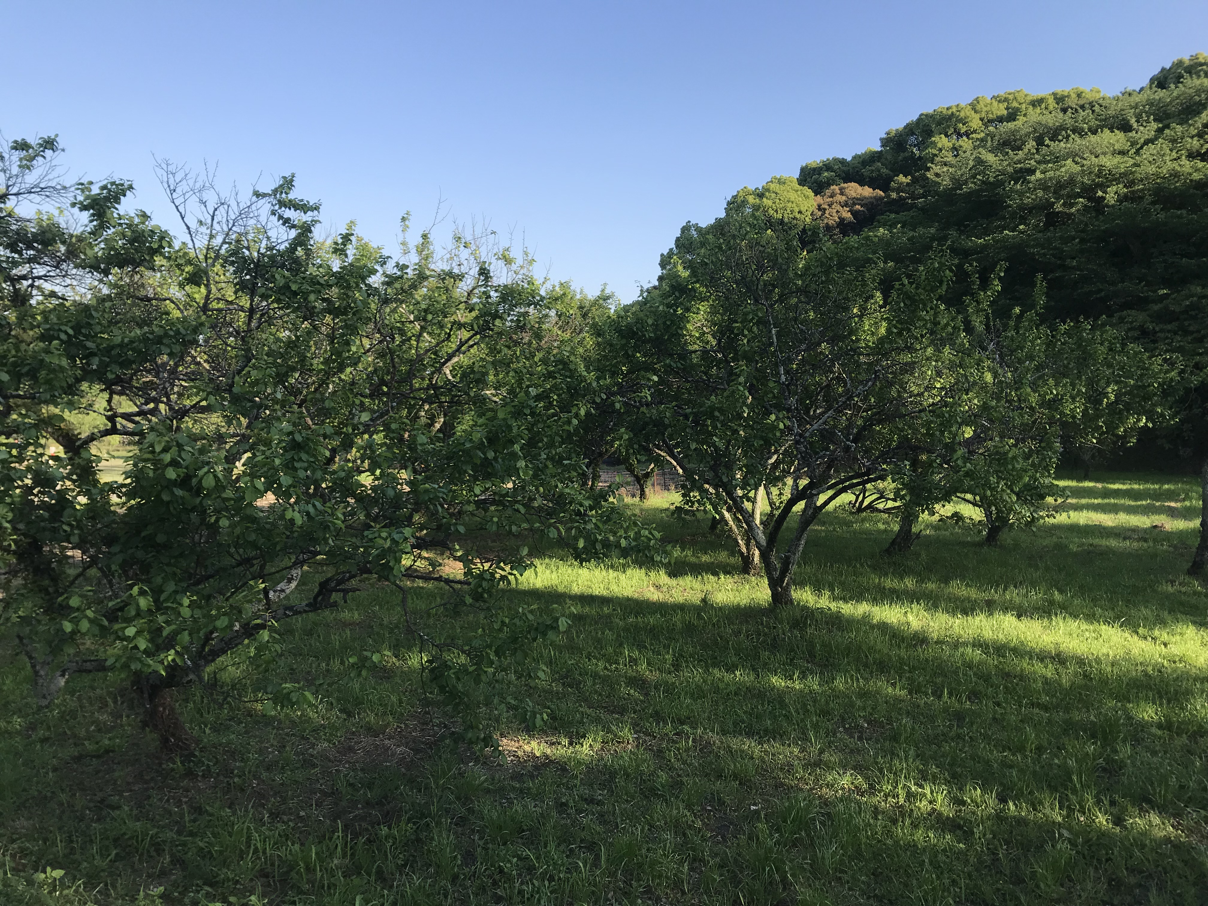 坂本八幡宮付近のウメの木